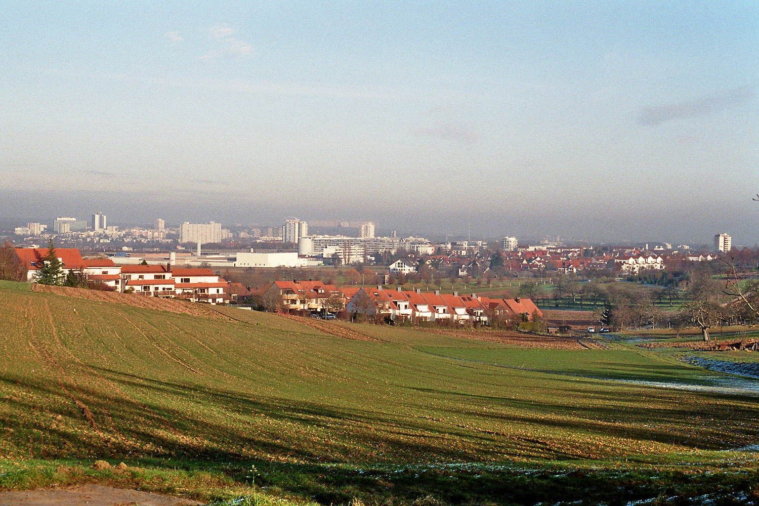 Stuttgart as seen from Oberaichen in Leinfelden-Echterdingen